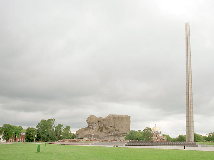 Брестская крепость главный монумент